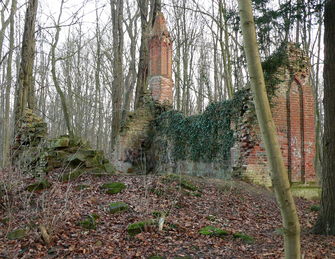 Mausoleum von Alten (Hemmingen)